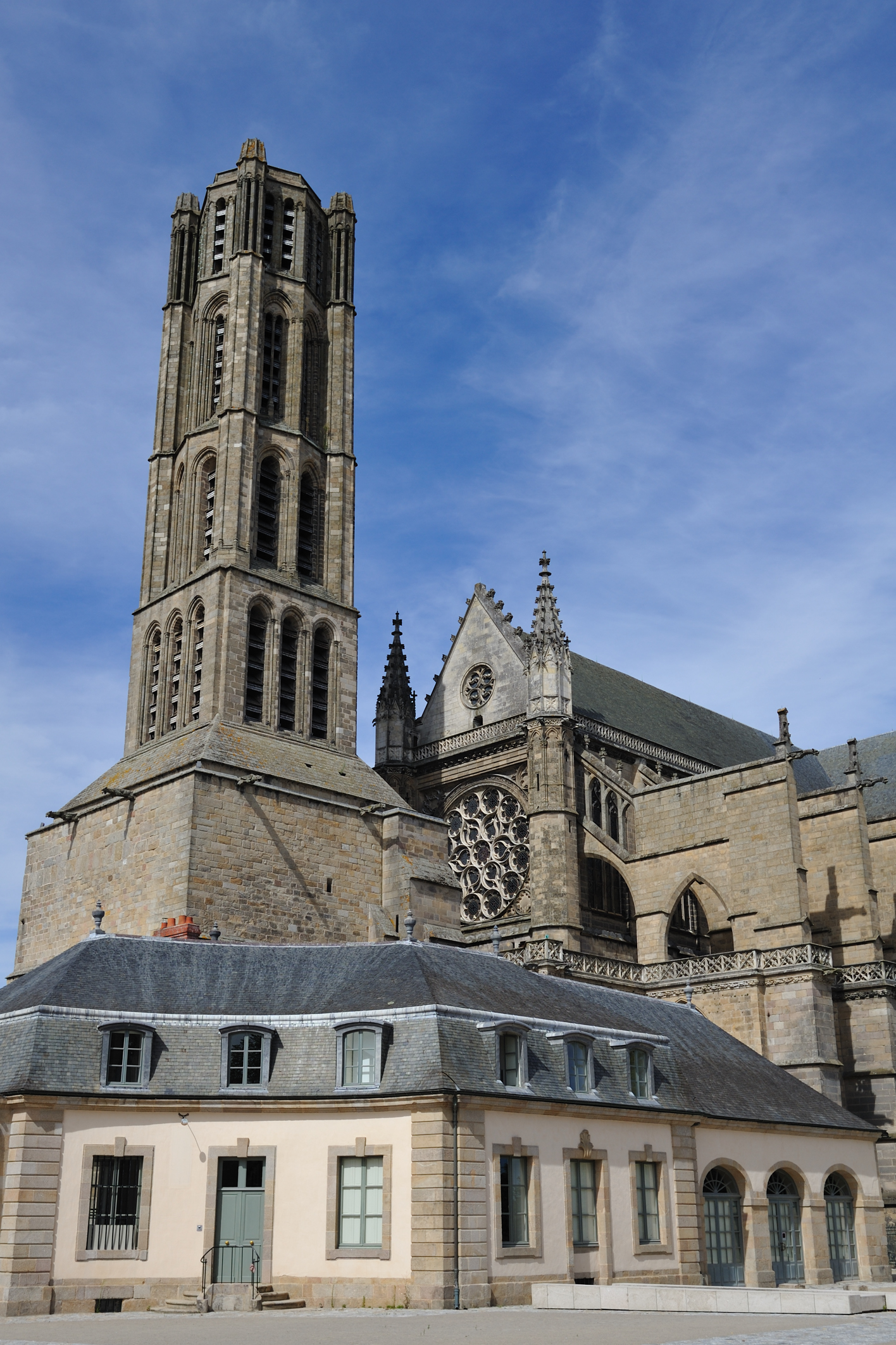 Cathédrale Saint-Étienne, Limoges, Haute-Vienne, France